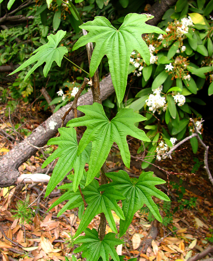 Dioscorea brachybotrya, RN Altos de Lircay